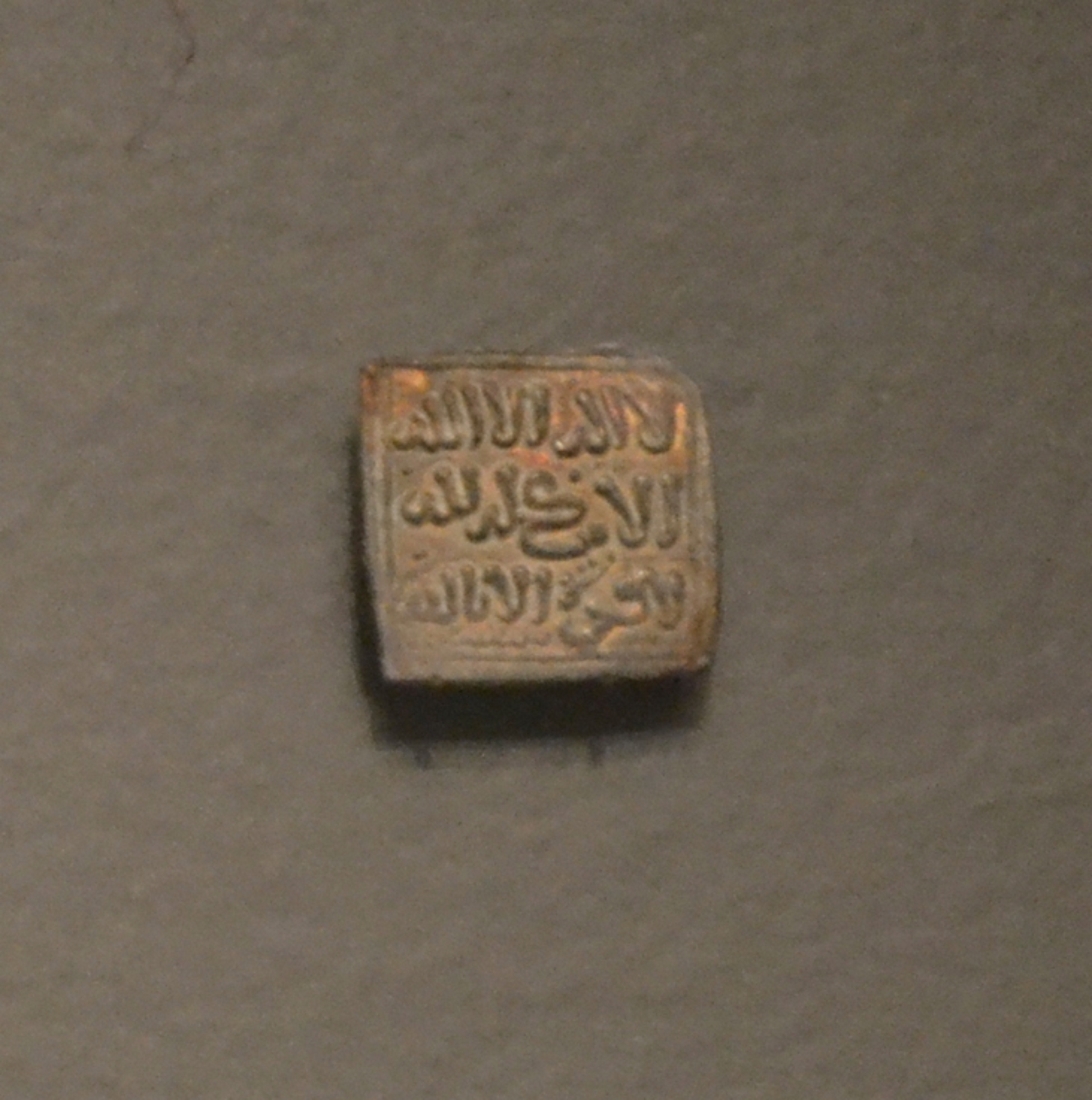 Dirham almohade de Valencia (siglo XII) . Museo de Prehistoria de Valencia.